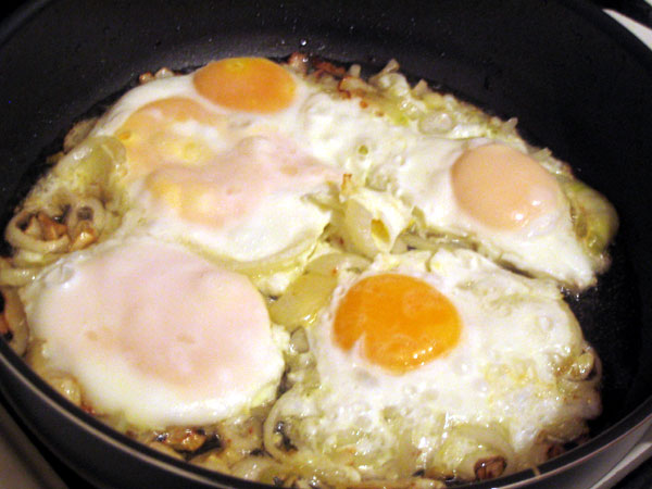 Eggs